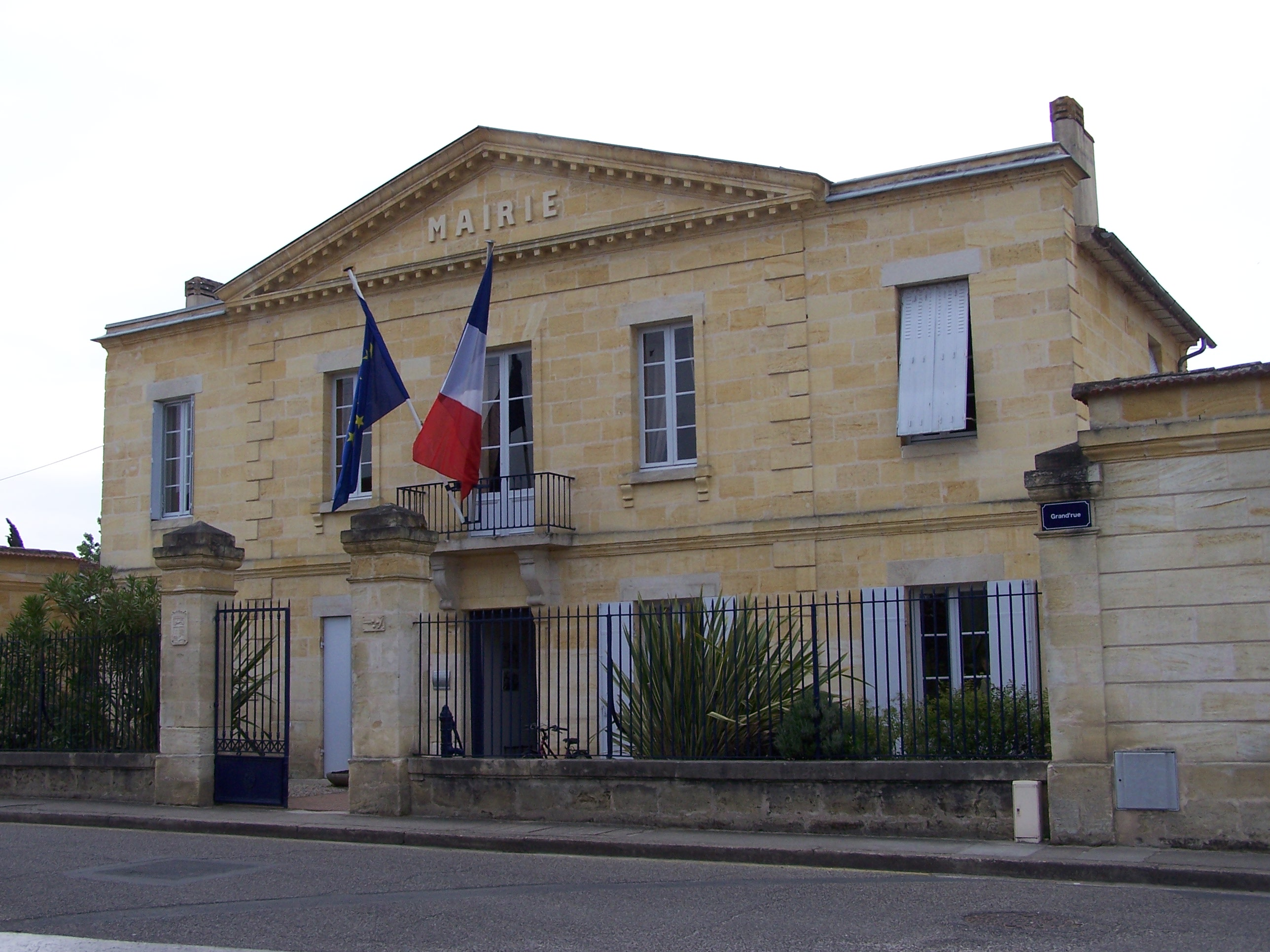 Mairie de Portets, Gironde, France